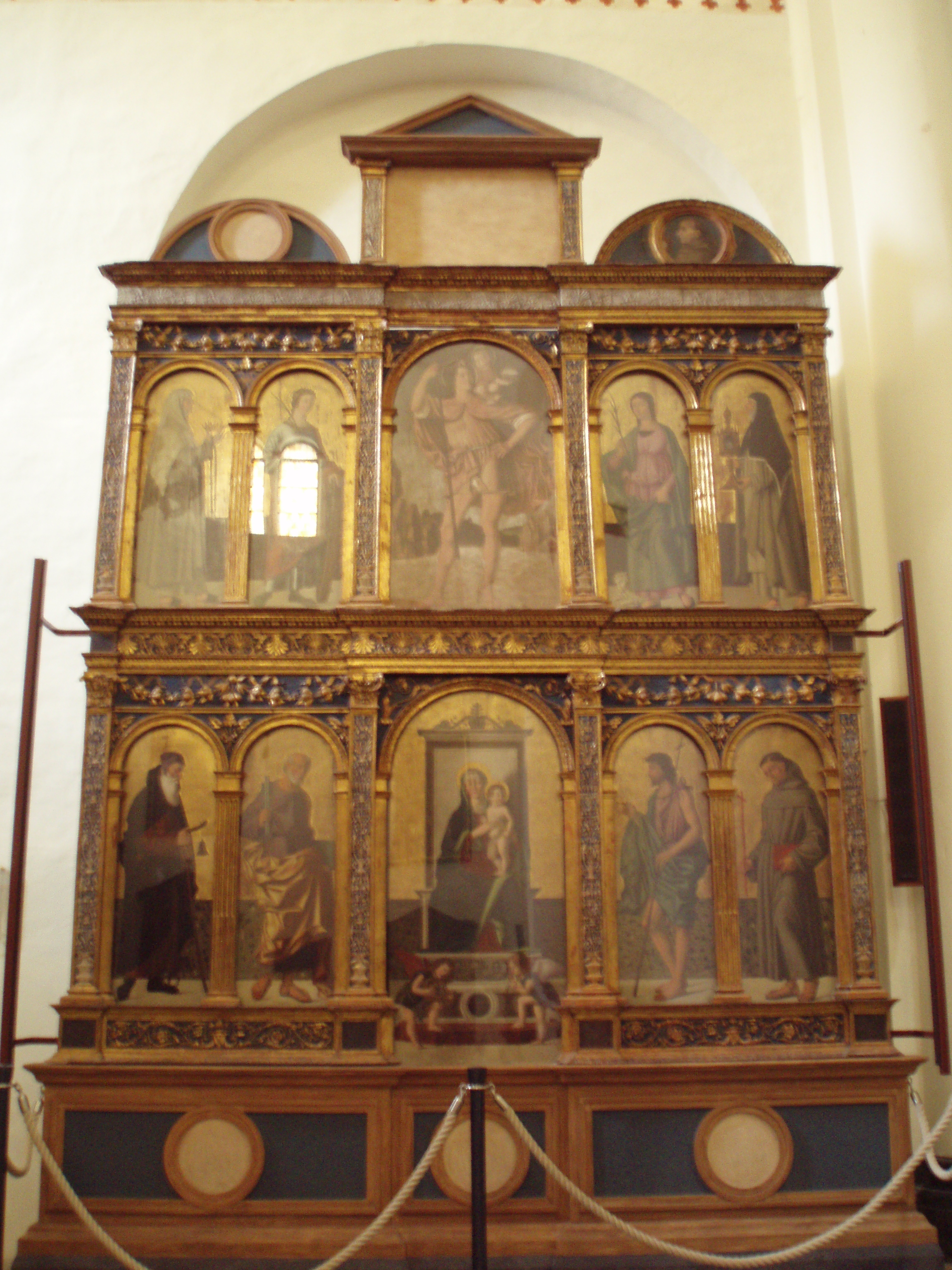 Polyptyque reconstitué de Filippo Mazzola de la collégiale de Cortemaggiore (Italie)